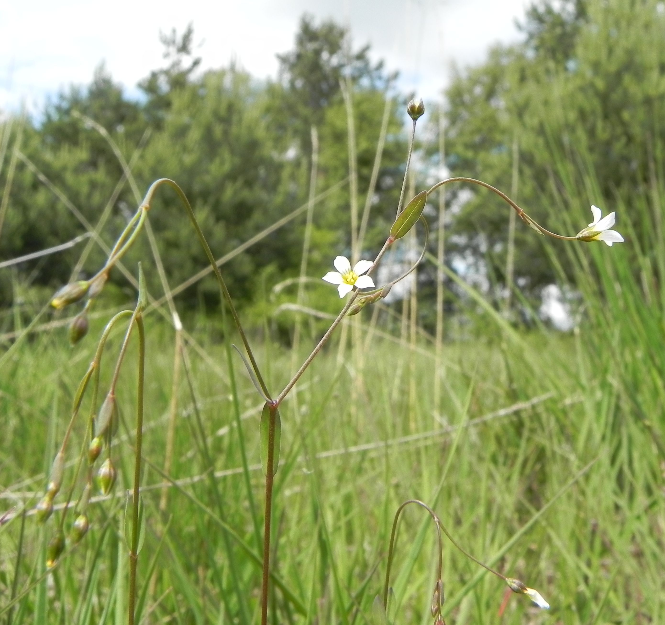 Purgier-Lein (Linum catharticum) im Becklinger Moor, Niedersachsen, Germany